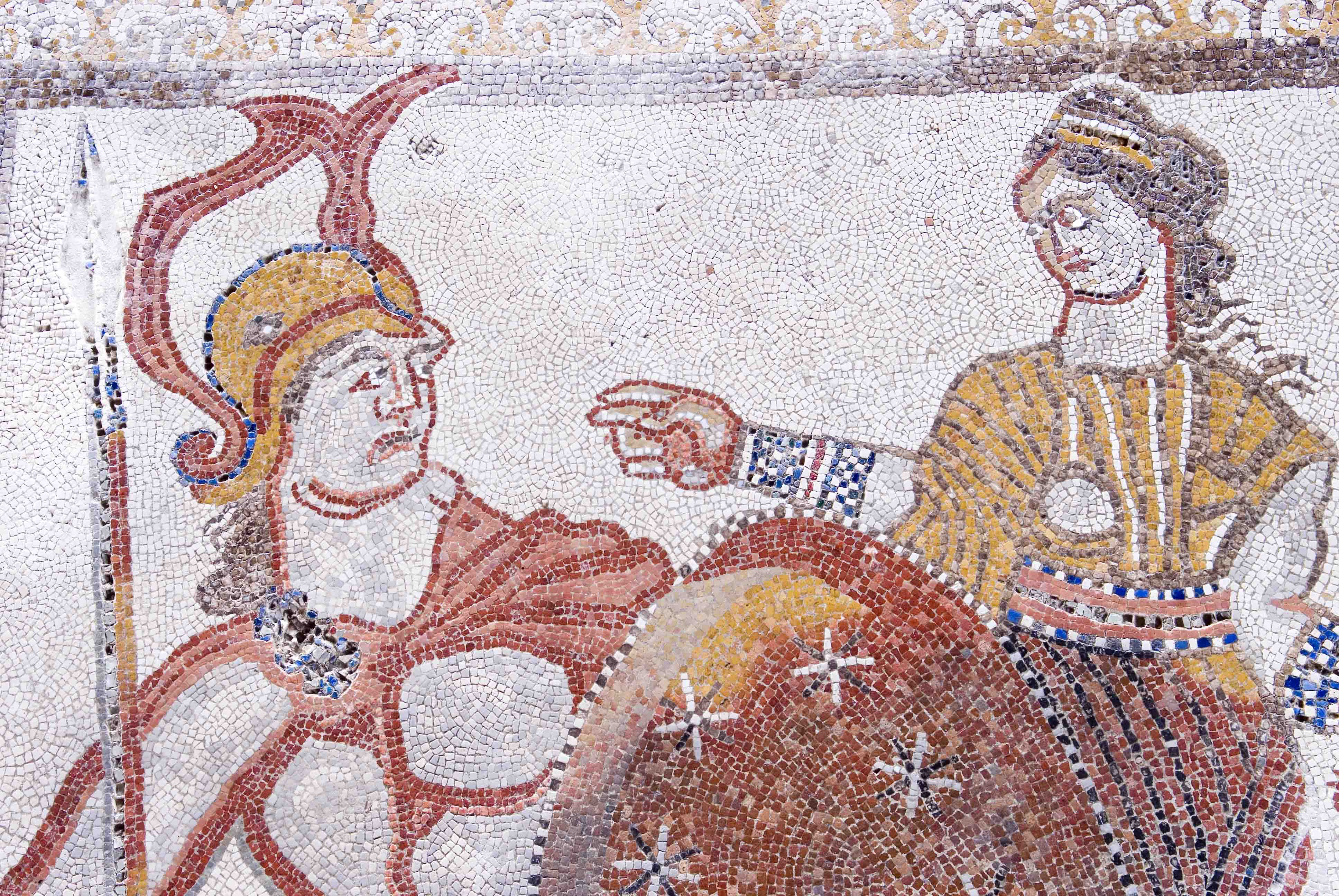 Detalle del mosaico de La muerte de Adonis, Villa Romana de Carranque